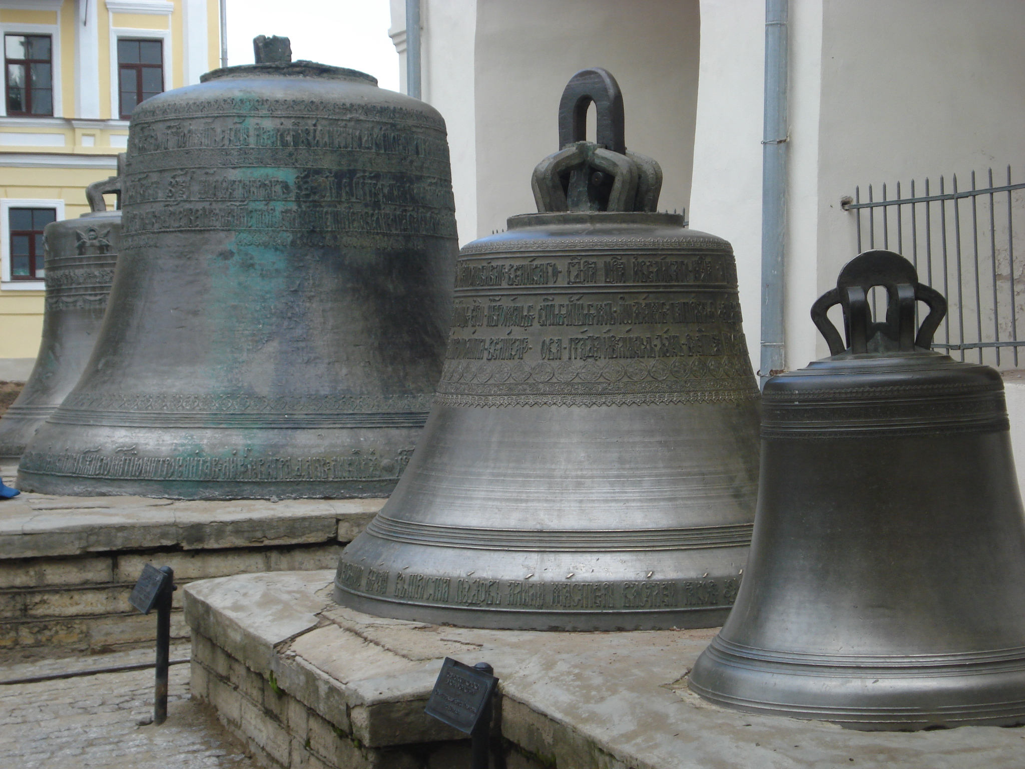 Звона у парку Новгородског кремља. 5. август 2009. Аутор: Јакша П.